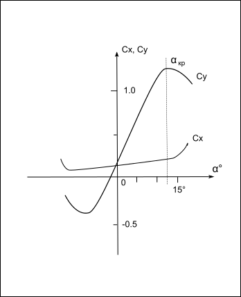 Зависимость коэффициента аэродинамического сопротивления и подъемной силы (drag, angle of attack) для крыла с несимметричным профилем при неизменном Re